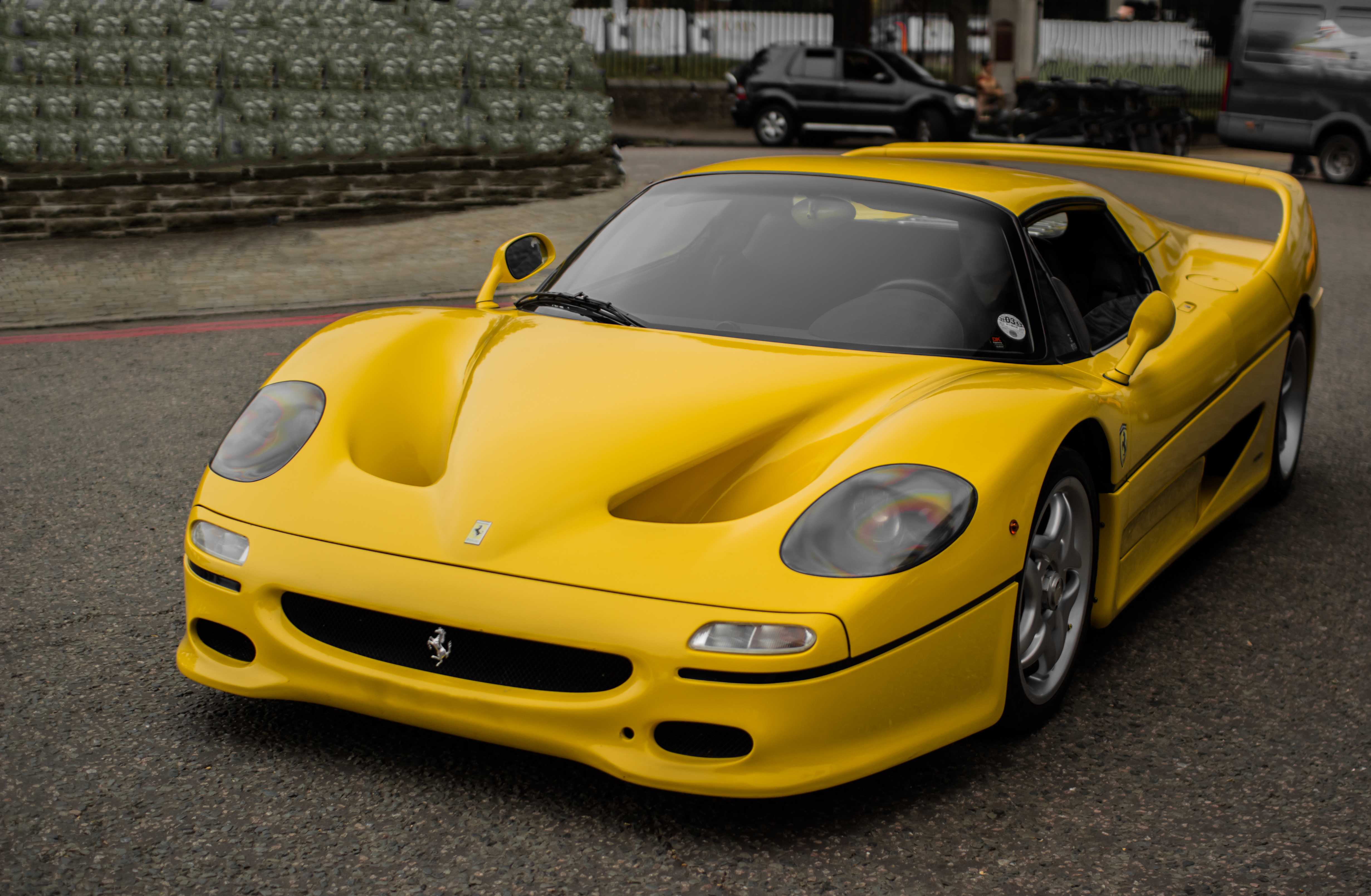 F50